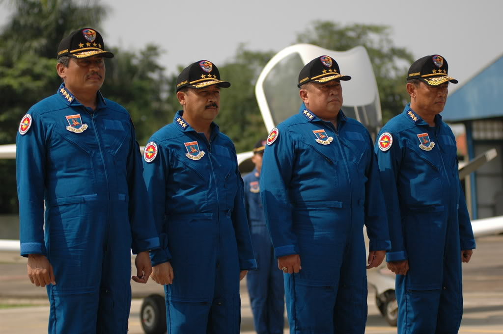 Sertijab